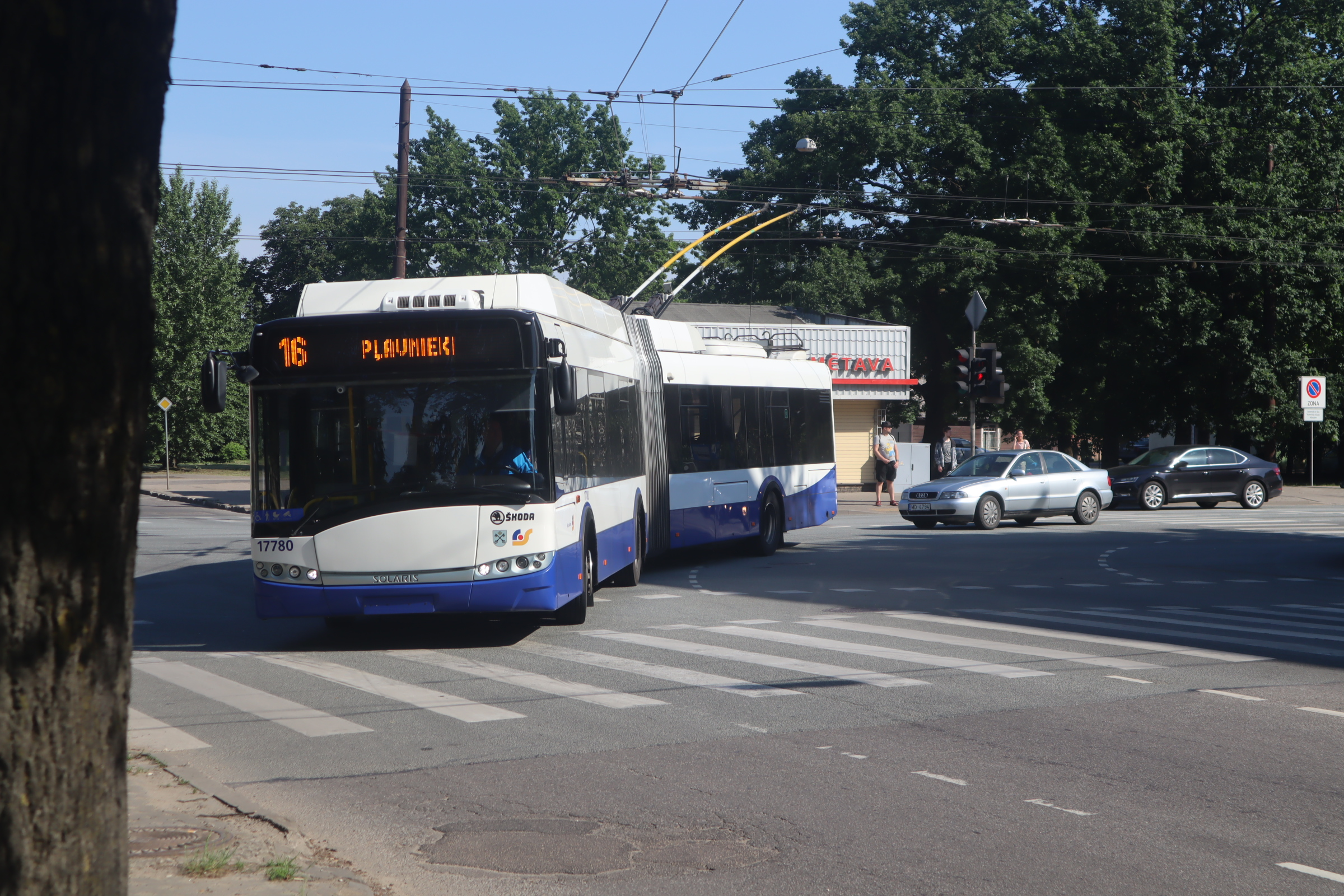 16. maršruta trolejbuss (Šmerils-Pļavnieki) veic pagriezienu no Brīvības gatves uz Lielvārdes ielu.